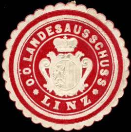 Sealing stamp Title: O.Ö. Landesausschuss - Linz Description: rot, weiß, geprägt Place: Linz size: 4 cm